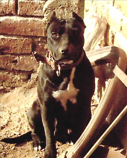 Pit Bull Terrier Americano Hembra.